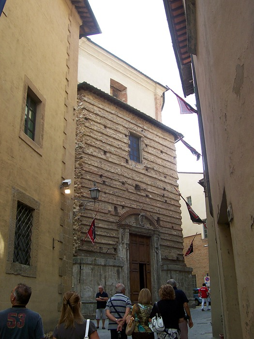 Montepulciano - Chiesa del Gesù